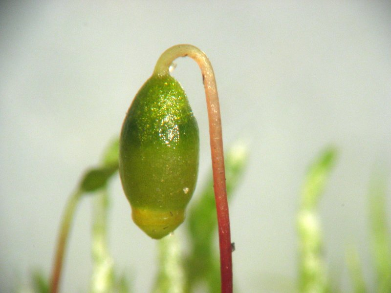 Silbermoos (Bryum argenteum), Sporogon bei 30x, Rostock